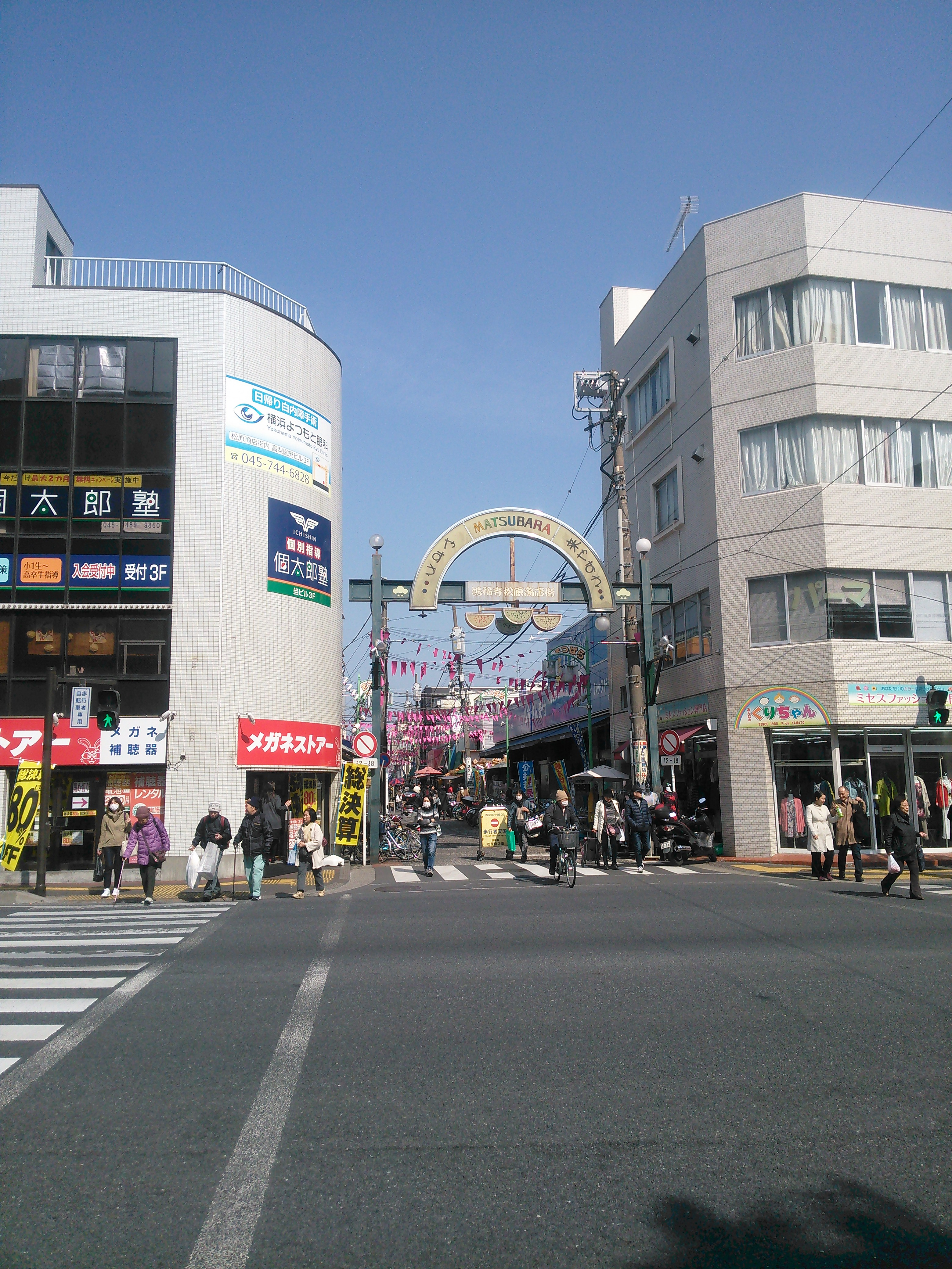 横浜市保土ケ谷区、洪福寺松原商店街 国道16号側ゲート